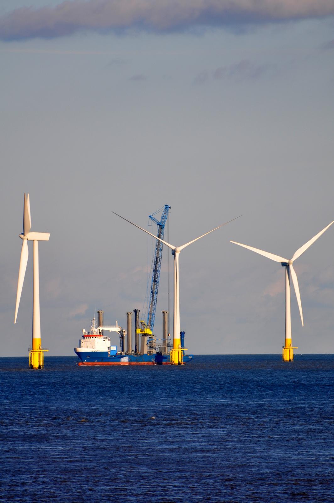 Wind turbines